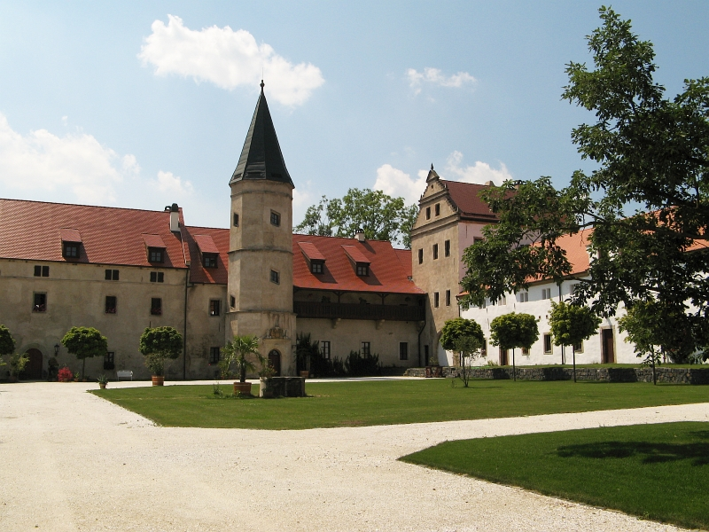 Zámek Libouchec, Libouchec 343, Libouchec.